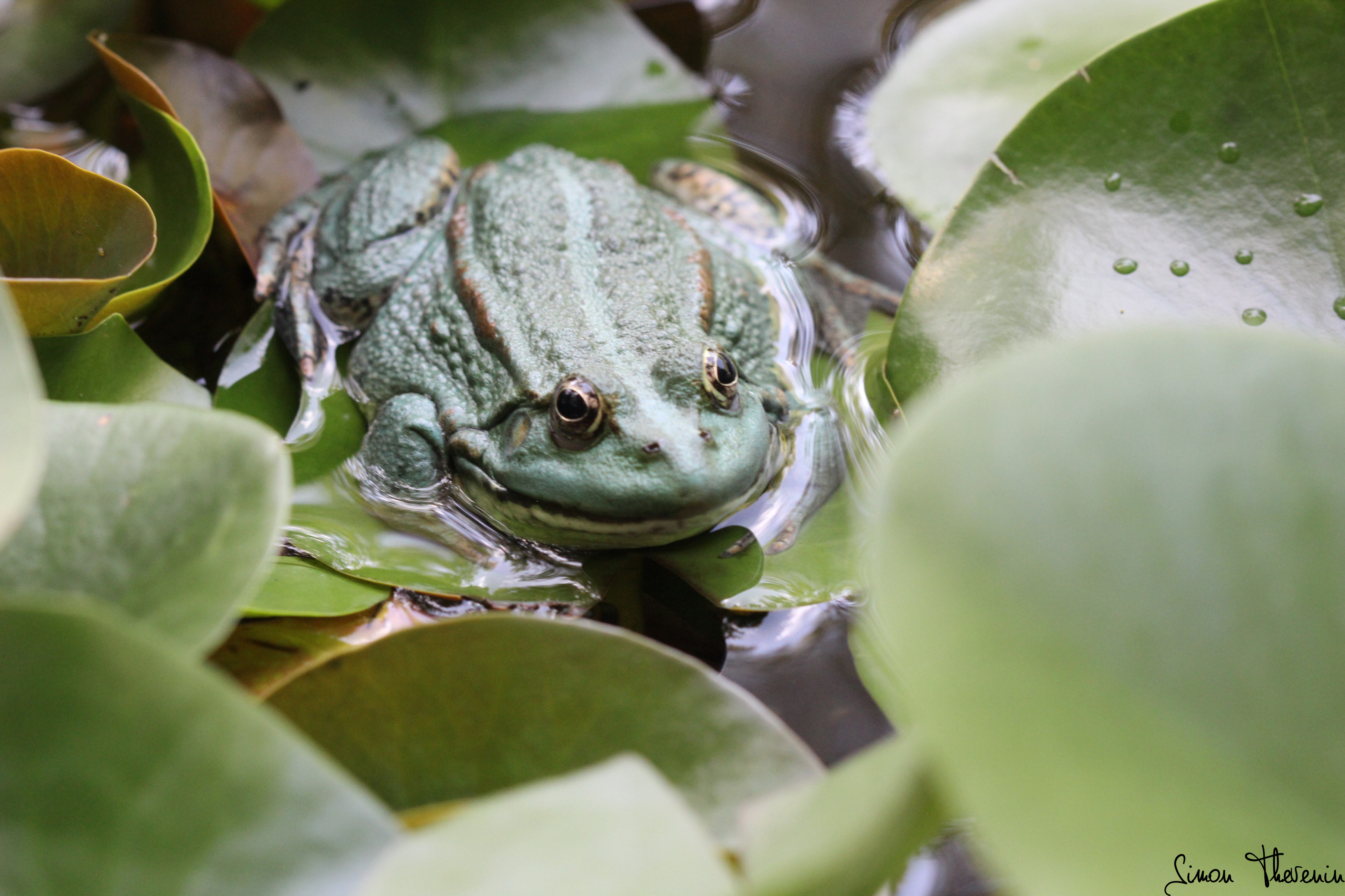 Photographie d'une Grenouille rieuse de la race Rivan 92 se trouvant dans un bassin à Rognes, prise par Simon Thevenin le 18 Septembre 2019